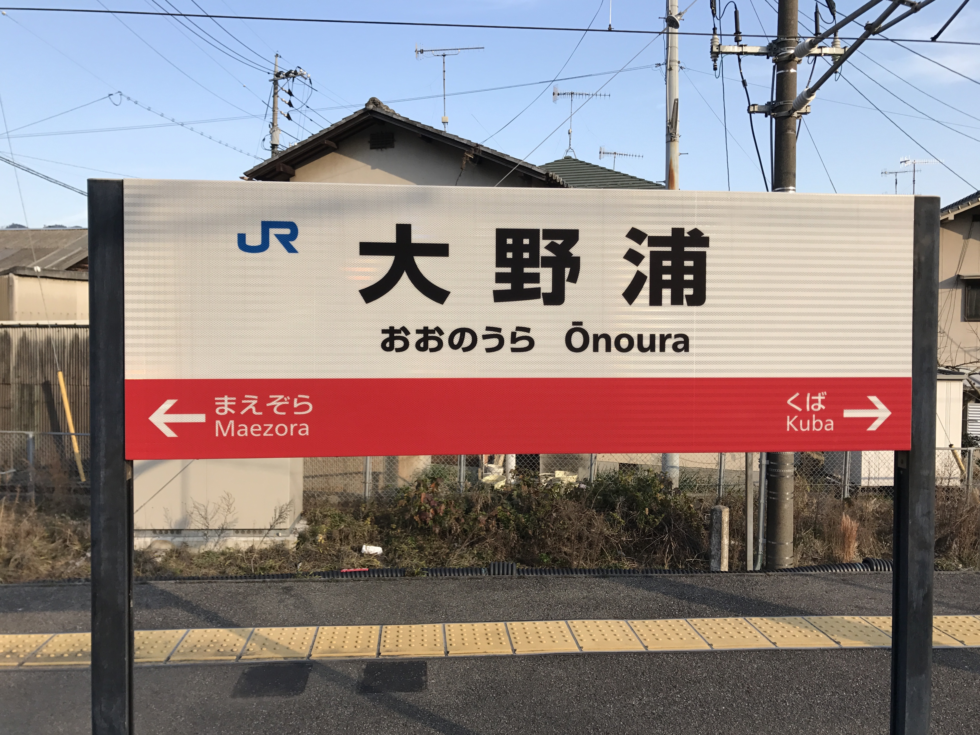 大野浦駅の駅名標